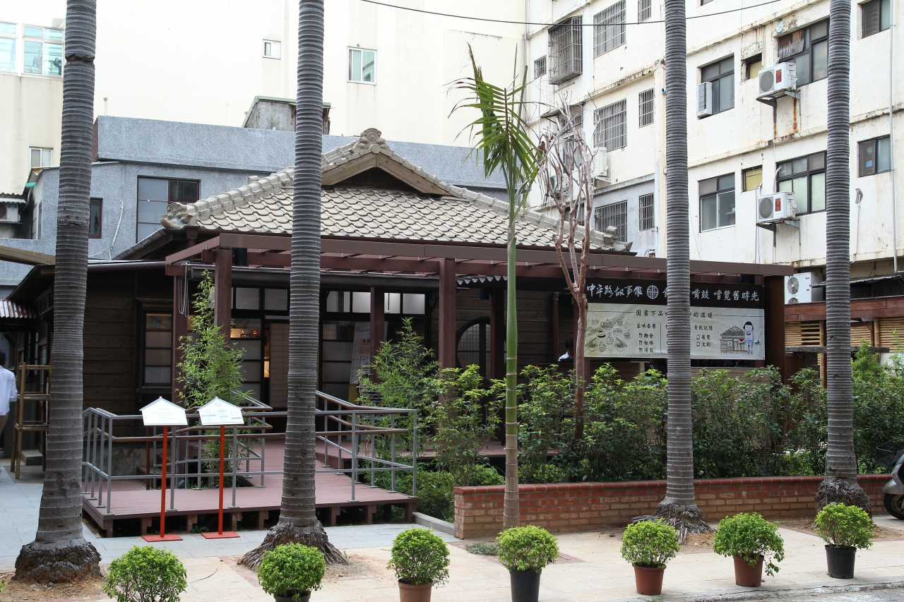 中平路故事館 外觀